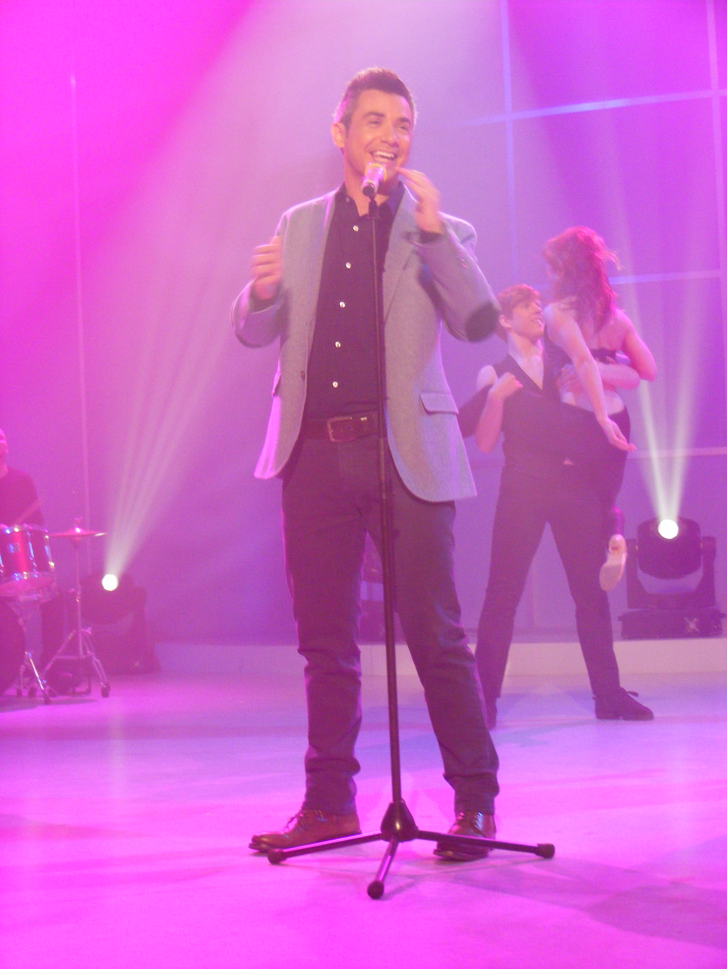 David Civera cantante español en el 906º programa de Luar